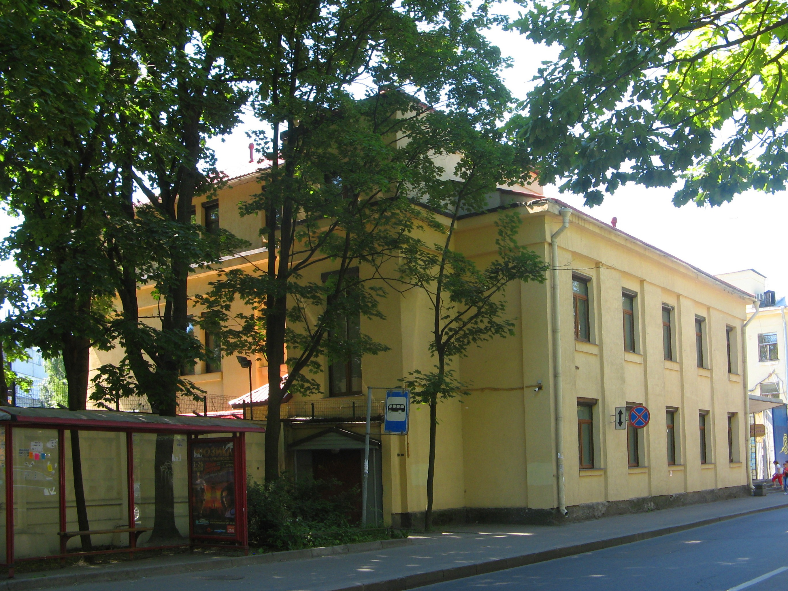 Здание Александровского приюта для арестантских детей. Санкт-Петербург, ул. Профессора Попова, д. № 38